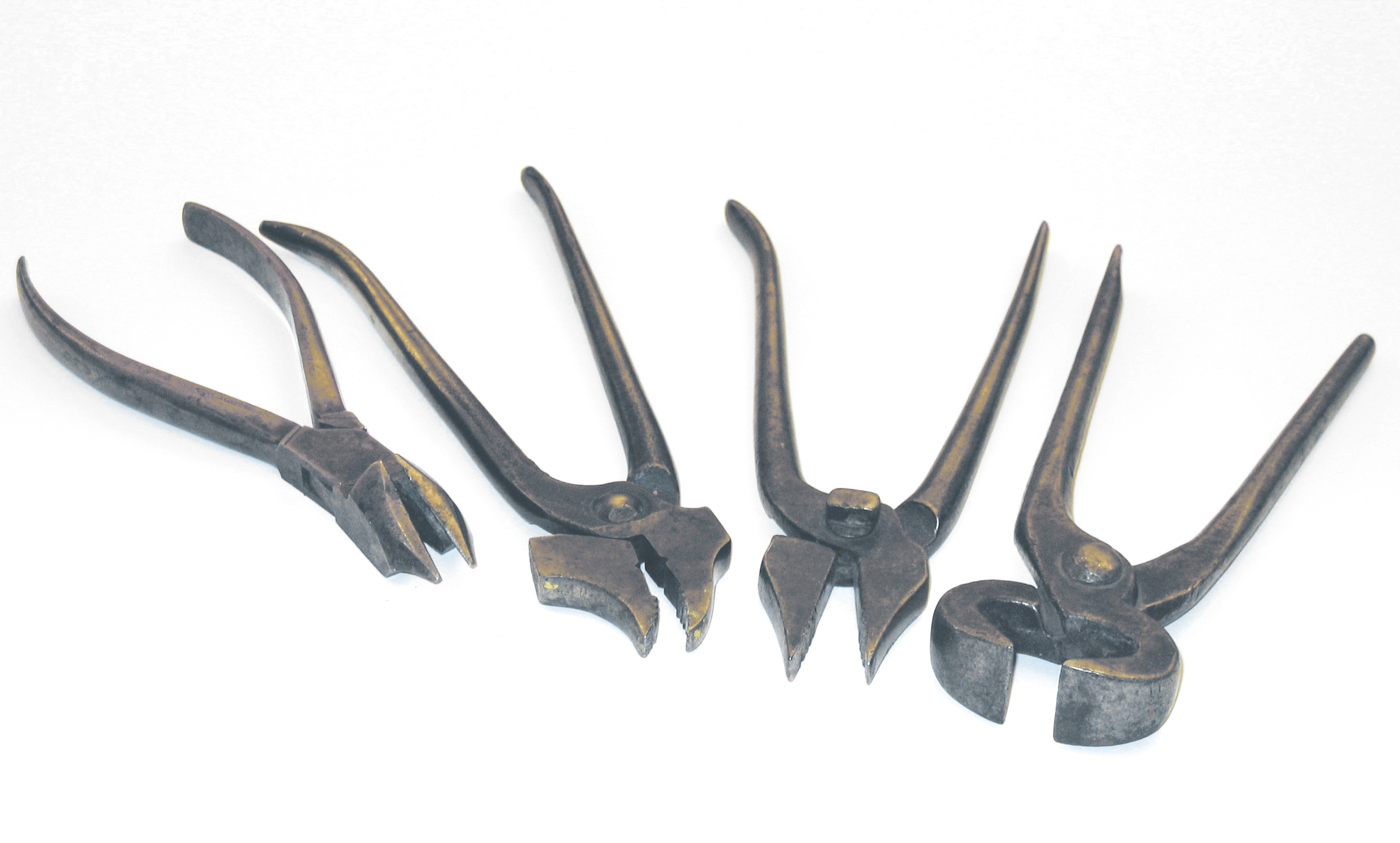 Jeu de pinces source : outils personnels / photo : Dominique grassigli